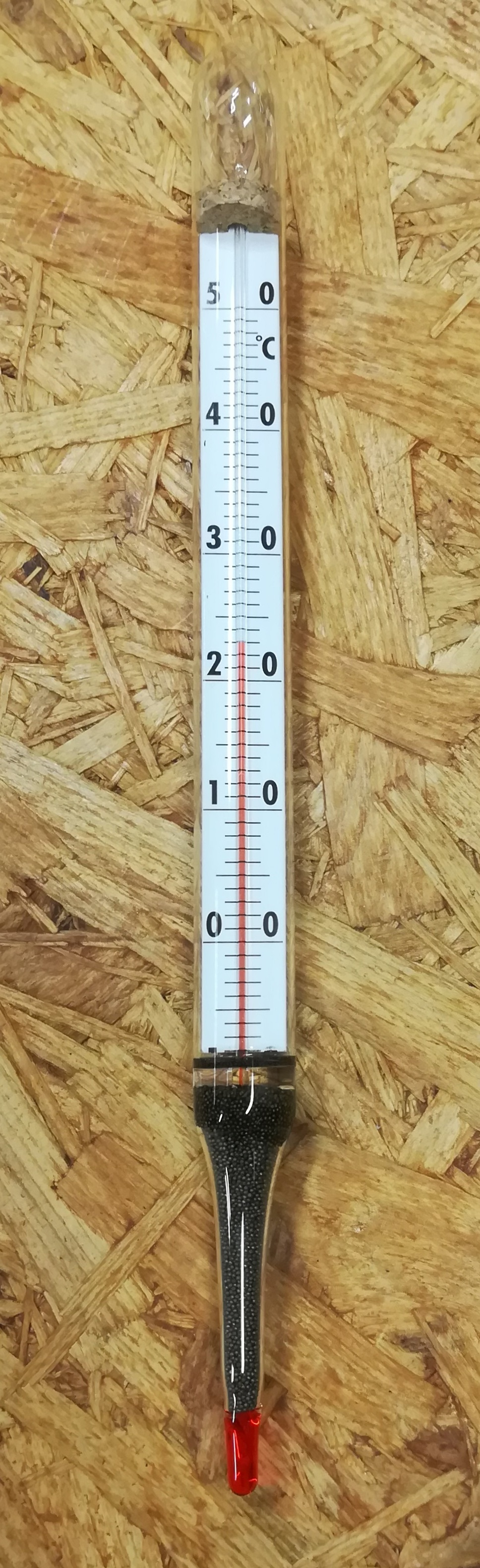 Schwimmthermometer (Hersteller: Amarell, Deutschland), Länge 25 cm, Durchmesser 1,7 cm, Messbereich 0 - 50 °C, Teilung 1 °C, Füllung Petroleum, beschwert mit Schrot.